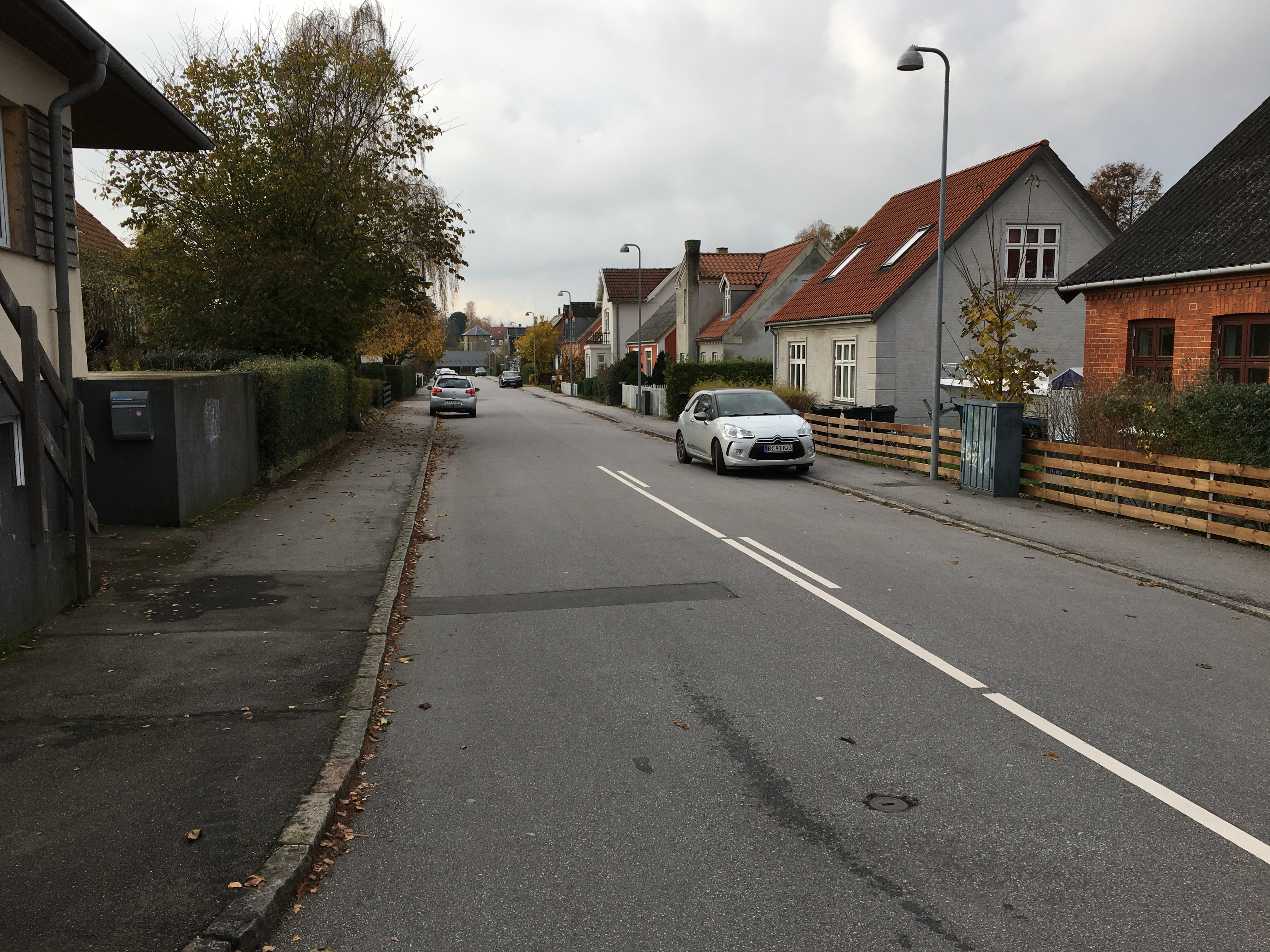 Fixvej i Næstved